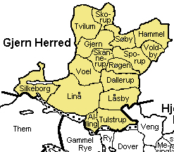 Gjern Herred, Skanderborg Amt, Denmark Source: Map by Svend-Erik Christiansen